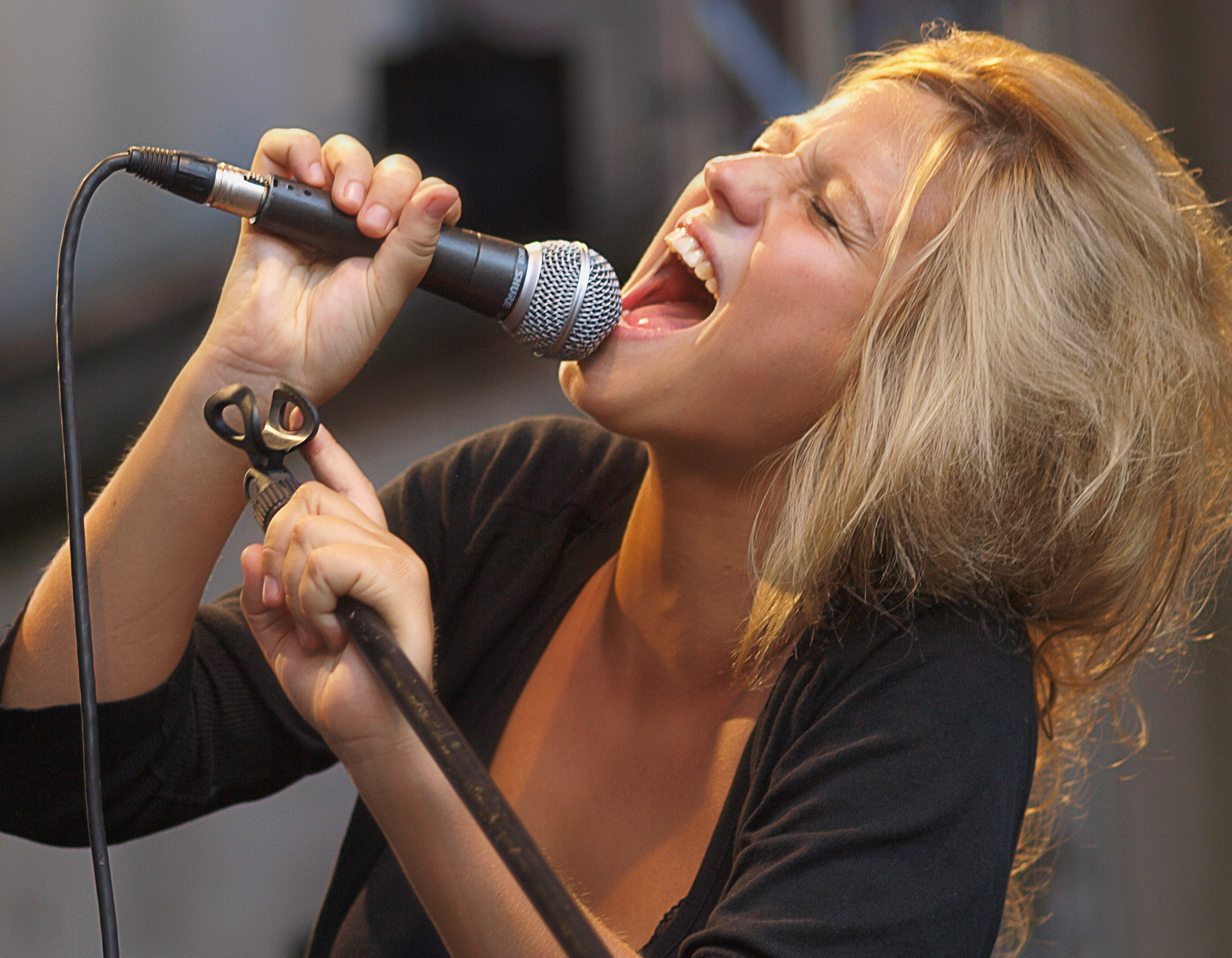 Selah Sue beim Bardentreffen 2010 in Nürnberg